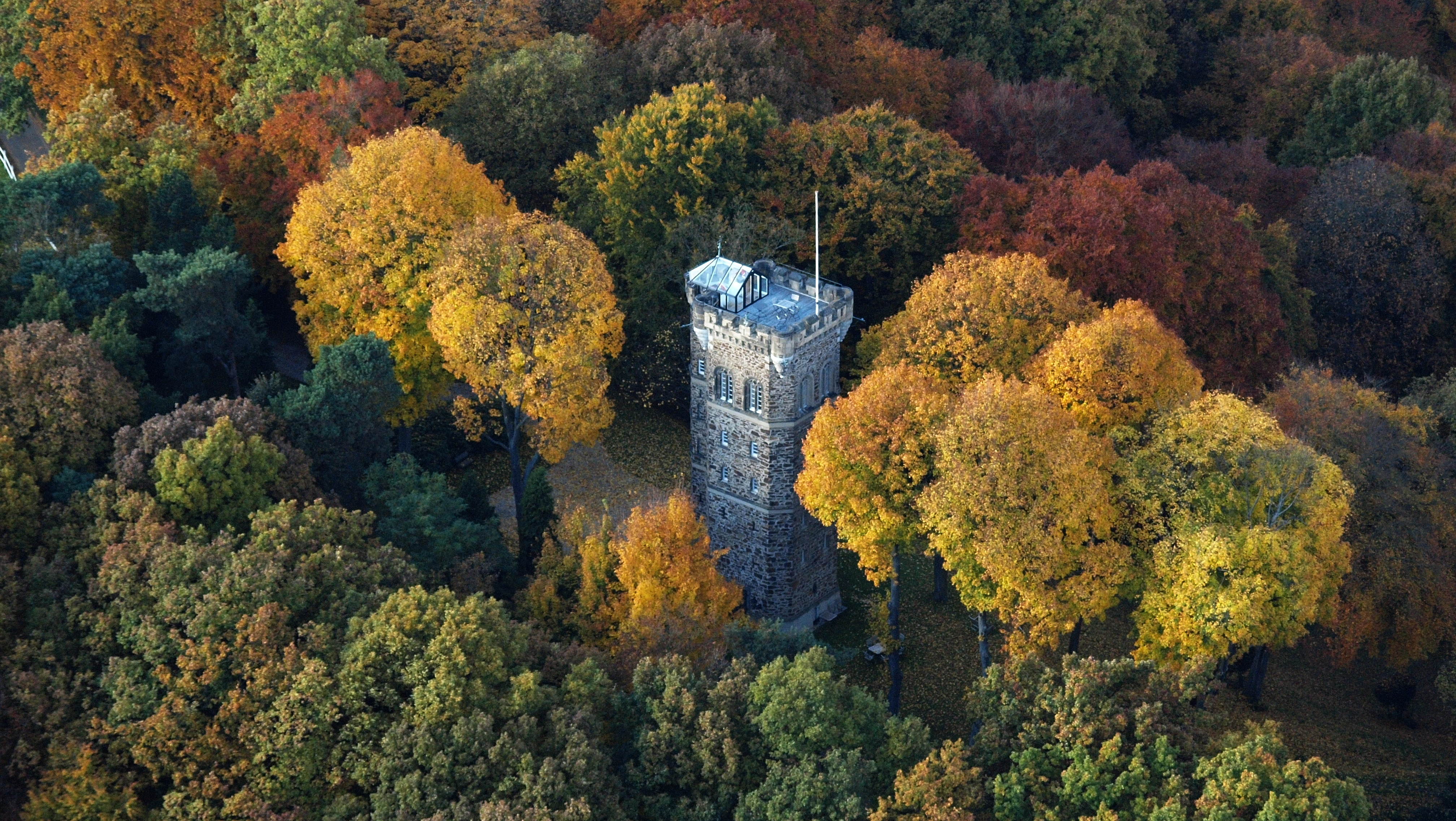 Humboldtsturm (Rathsturm), Rolandswerth, Stadt Remagen: Luftaufnahme (2015)